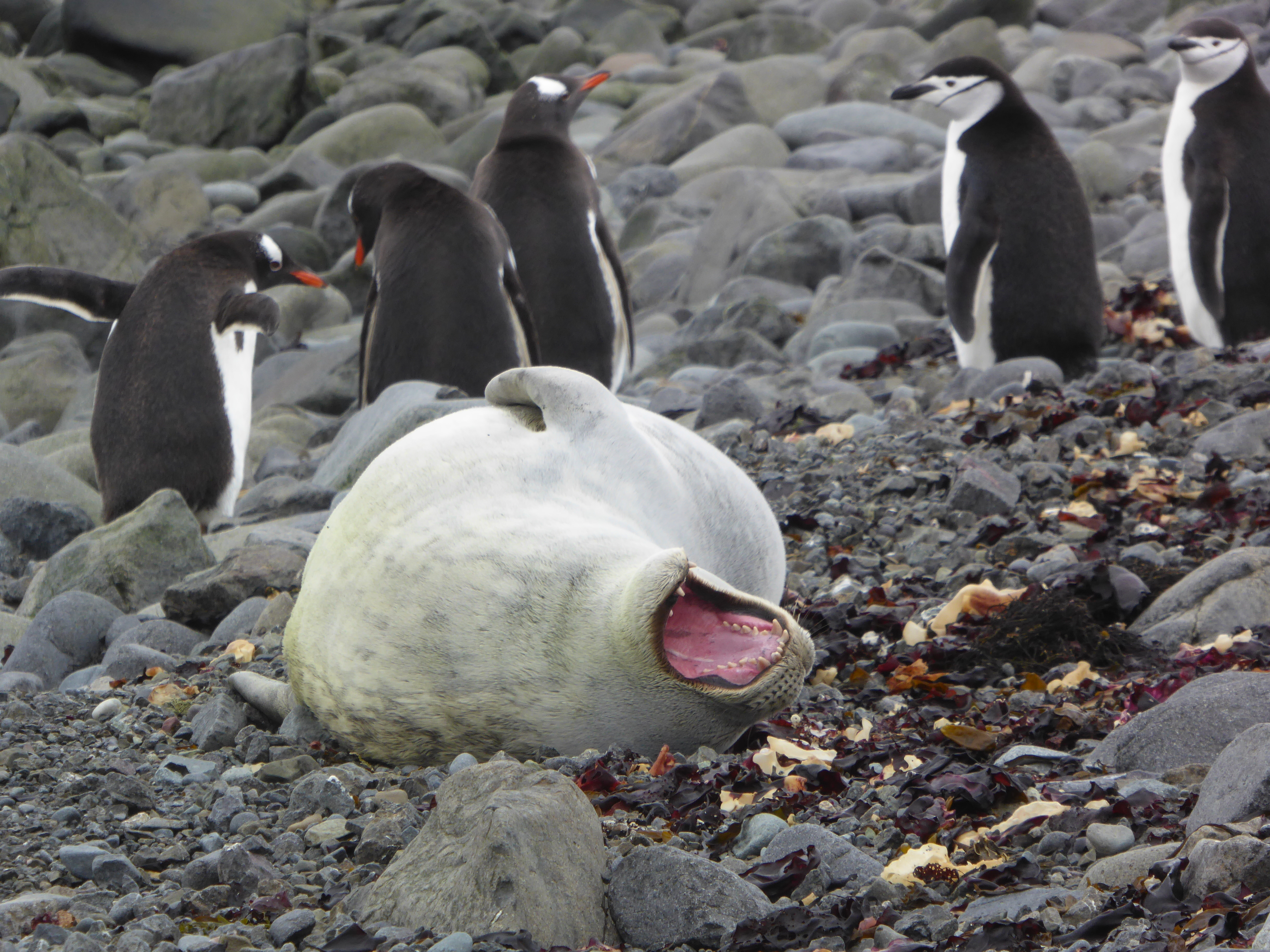 Fotografía tomada por estudiante de la tercera edición de la EVIIA (Sofía Bausero) en la Península Fildes, Isla Rey Jorge en las islas Shetland del Sur.